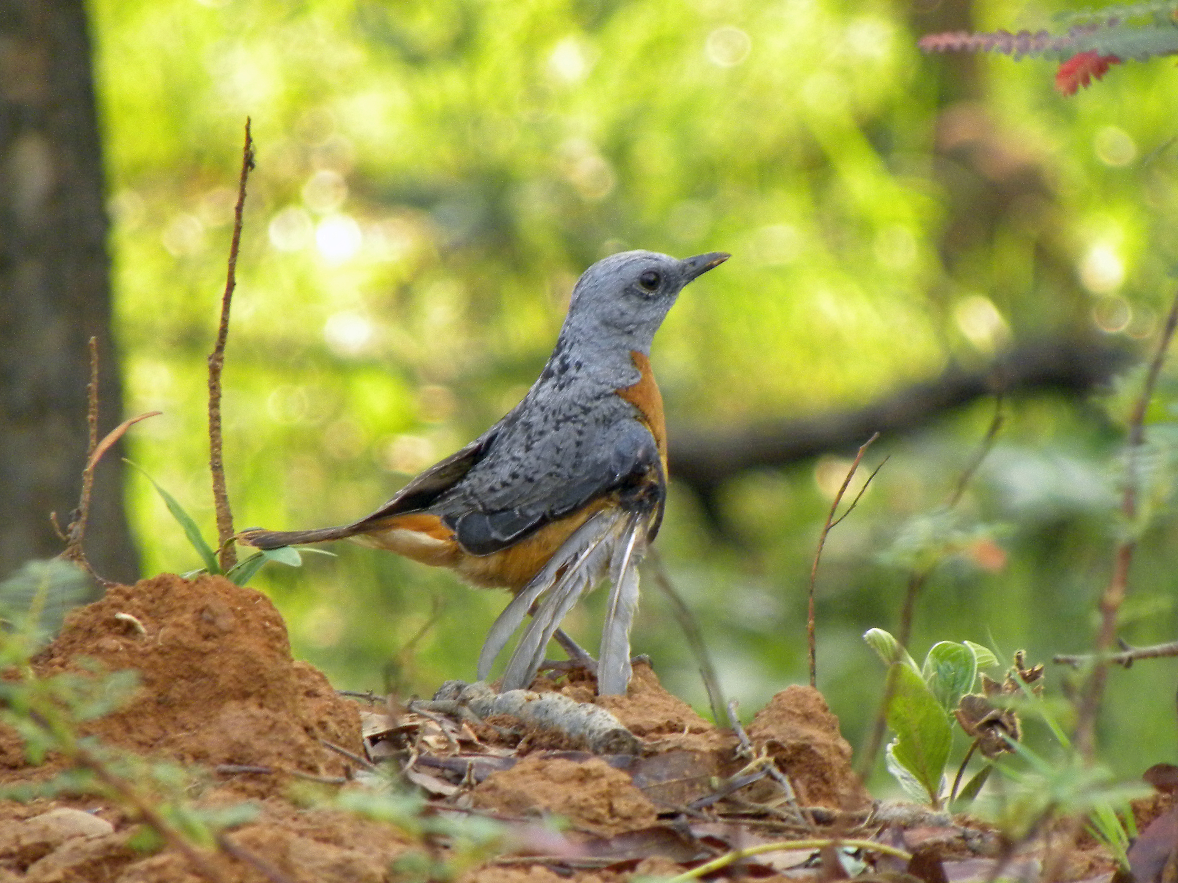 Miombo Rock-Thrush, Kakanda, DRC